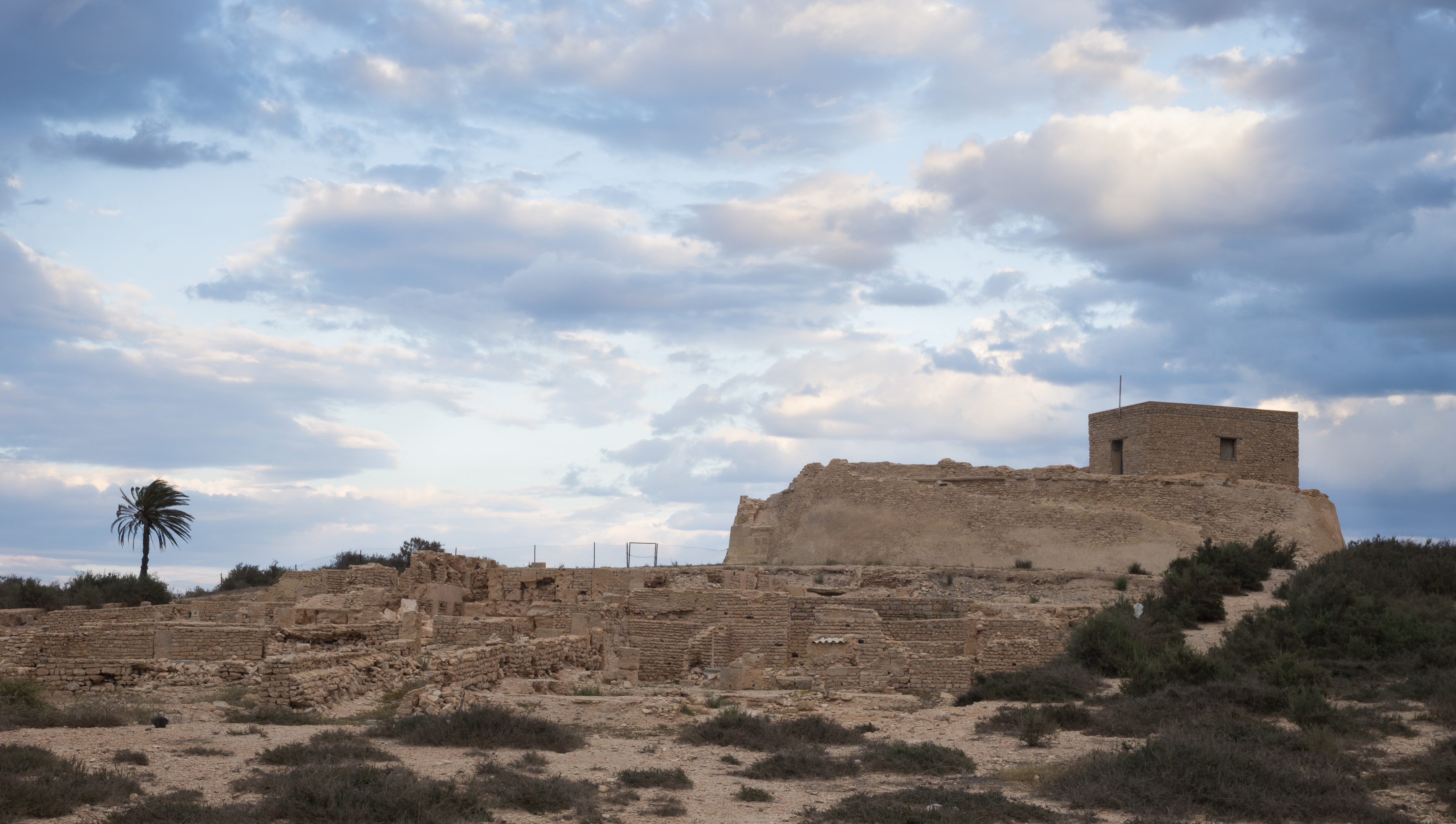 Bordj-el-Ksar, Ruines romaines à l'île Kerkennah (Tunisie)